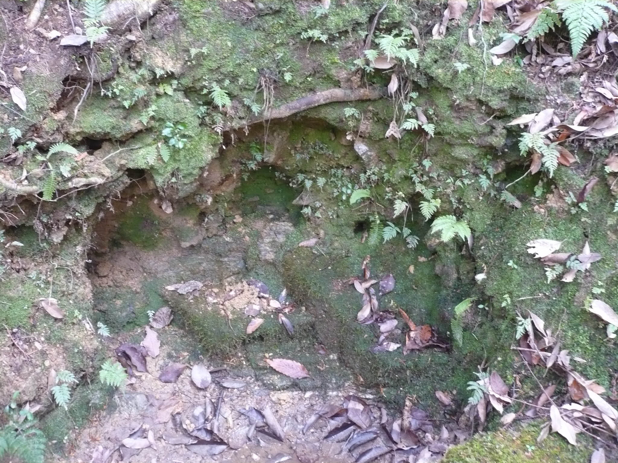 湧水